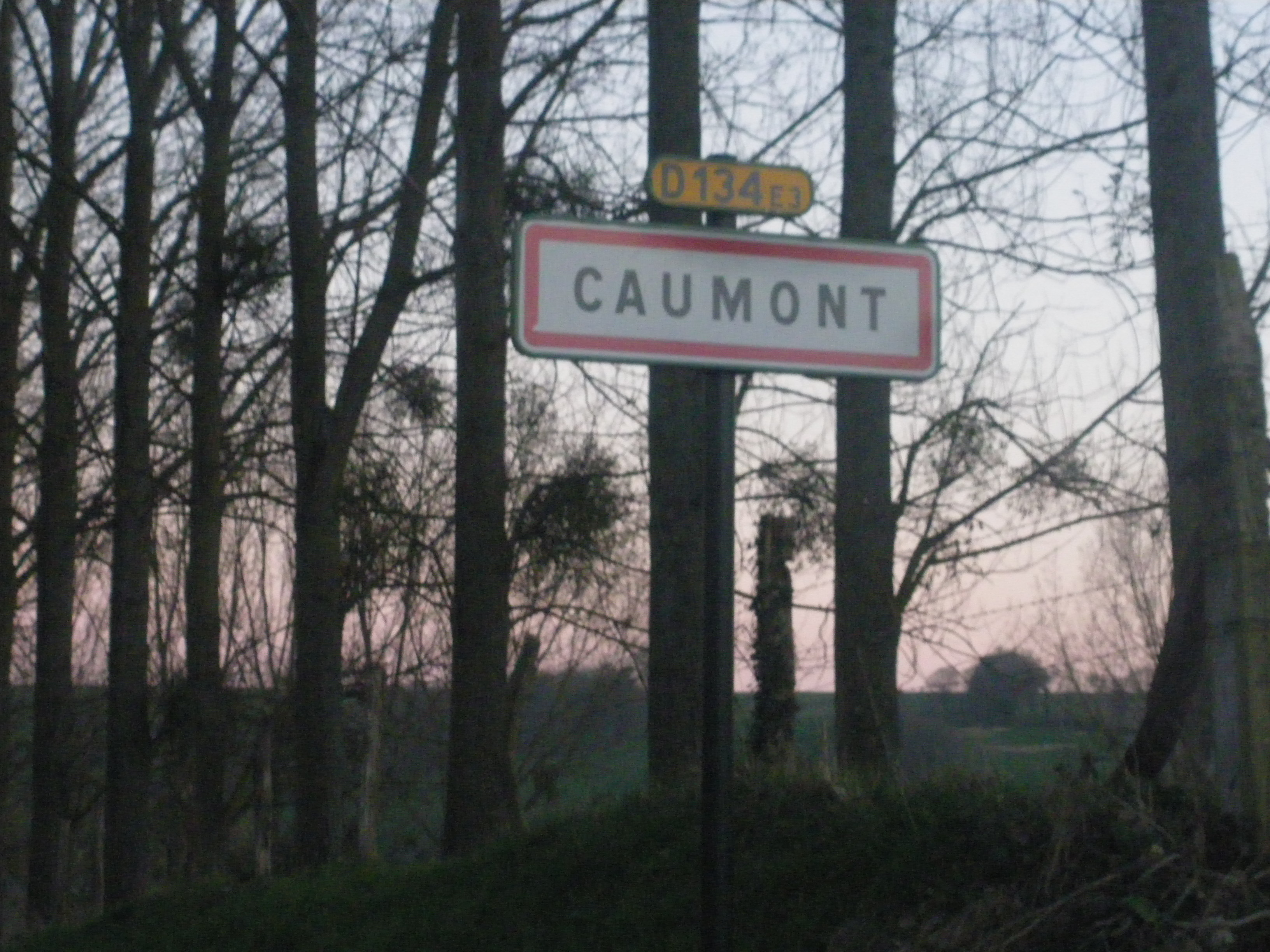 Panneau d'entrée de la commune de Caumont.